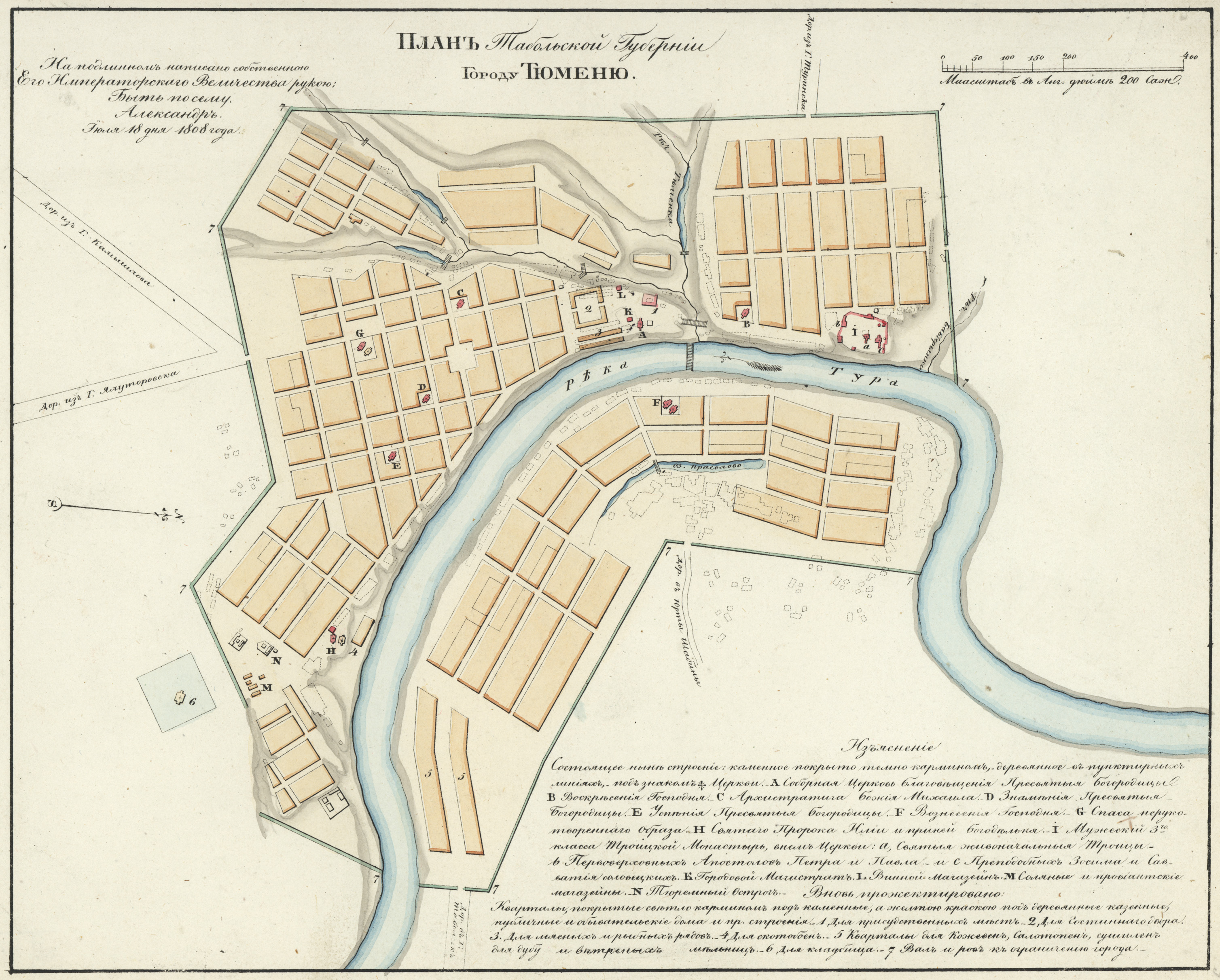 План Тобольской губернии городу Тюменю. На подлинном написано собственною Его Императорского Величества рукою: Быть по сему. Александр. Июля 18 дня 1808 года.